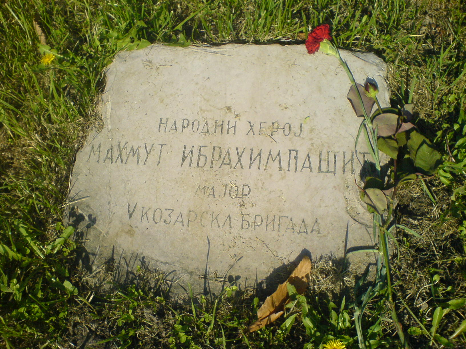 Гроб Маше Ибрахимпашића.